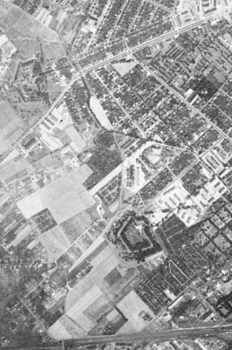 Okolice Fortu VIIIa, przyszłego osiedla Kopernika, Kopaniny i przyszłego stadionu piłkarskiego sfotografowane przez amerykańskiego satelitę wywiadowczego KH-4A 1023, 23 sierpnia 1965 r.